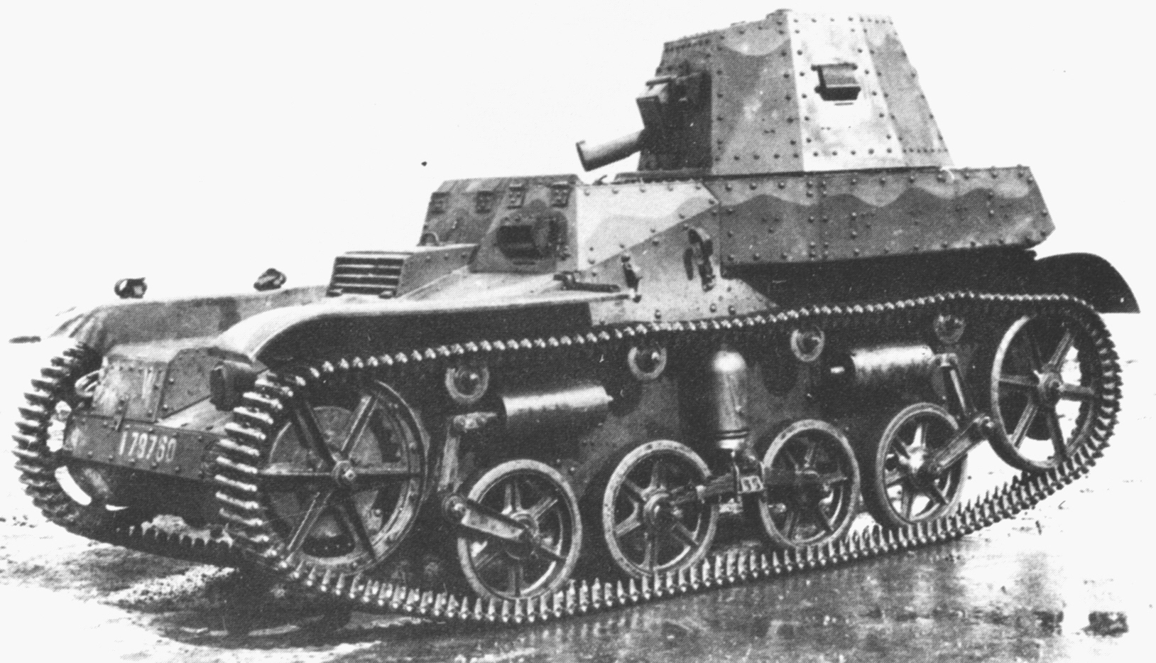 Digitale reproductie foto van prototype 79760 van de AMR 33